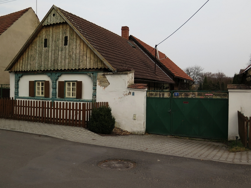 Usedlost čp. 15, Chodouny 15, na návsi, Chodouny.